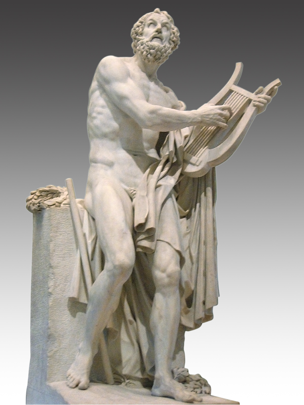 Le poète grec, aveugle, est représenté composant les chants de l'Iliade et de l'Odyssée.